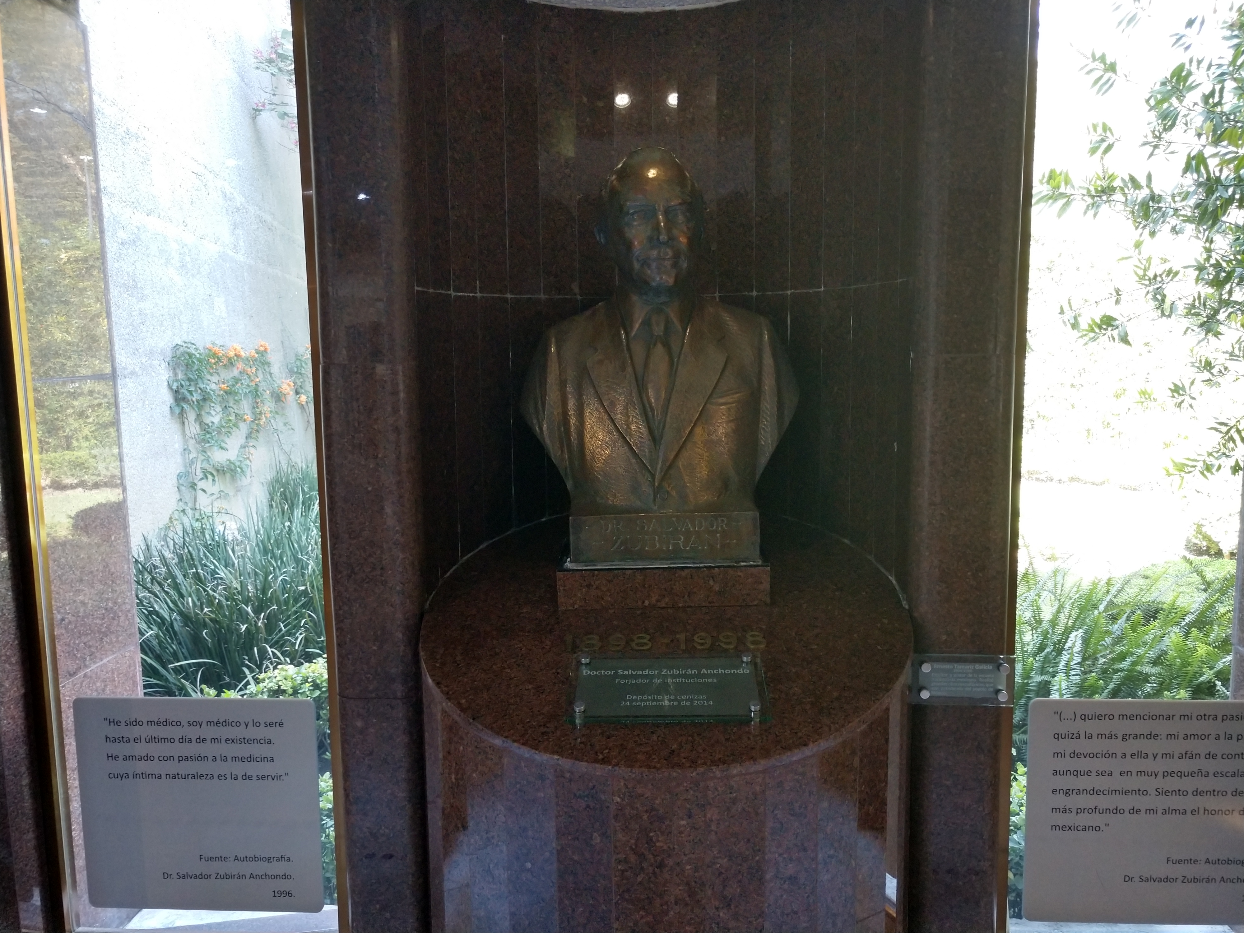 Instalaciones del Instituto Nacional de Ciencias Médicas y Nutrición Salvador Zubirán, Ciudad de México